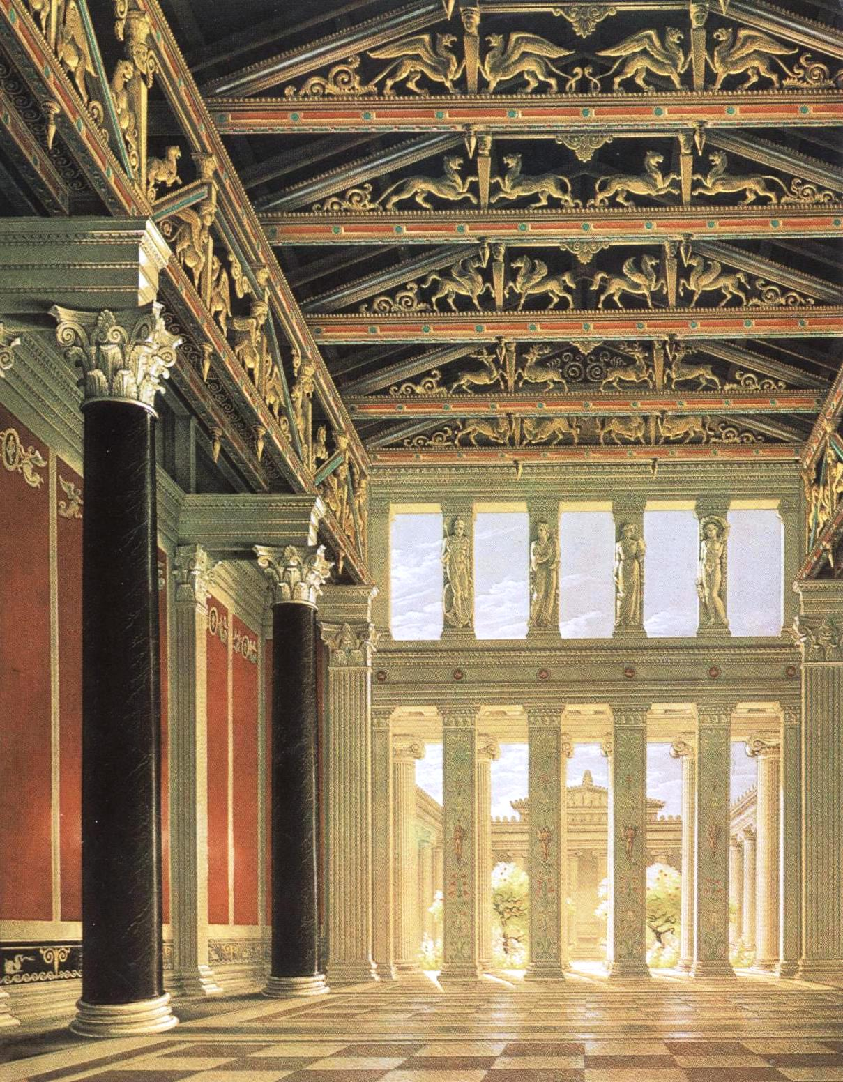 Karl Friedrich Schinkel, Innere Ansicht des Empfangssaals auf der Akropolis in Athen, 1834